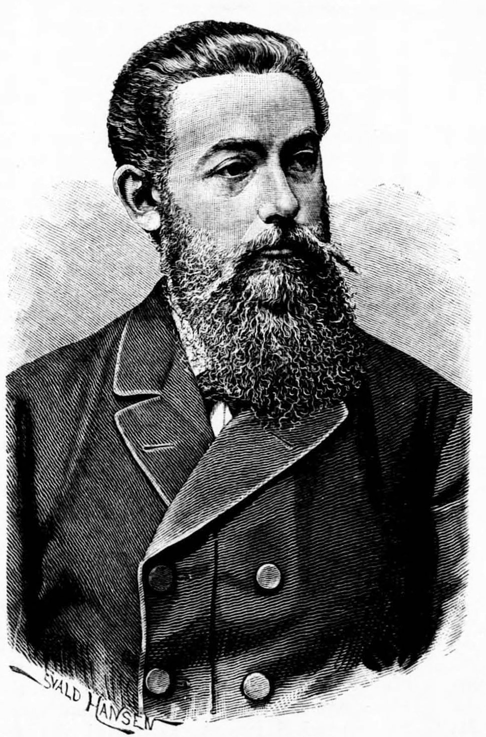 Andreas Hallén (1846-1925)